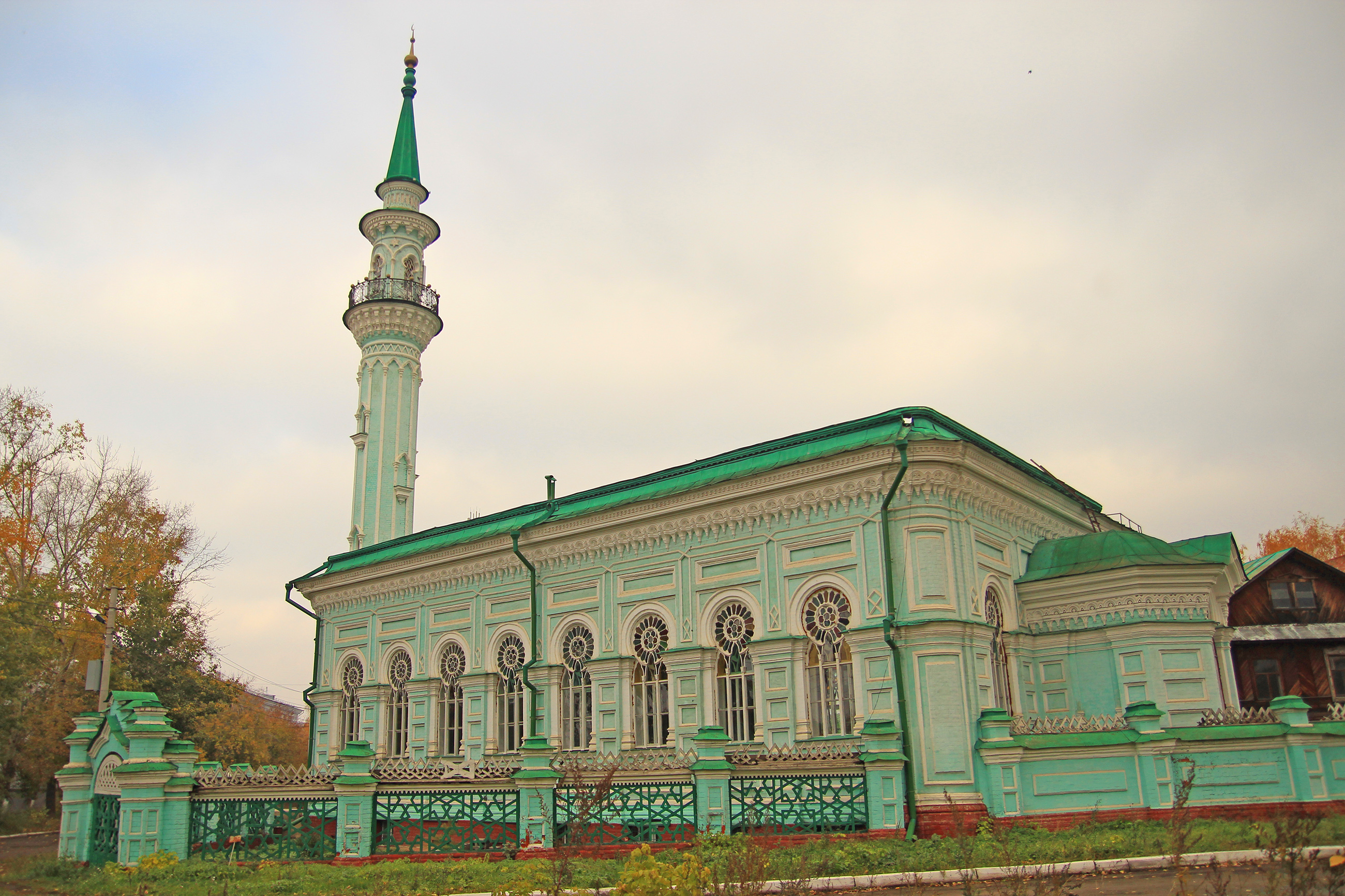 Мечеть Азимовская (Республика Татарстан, Казань, Фаткуллина улица, 15 (бывш. Сабанче улица))